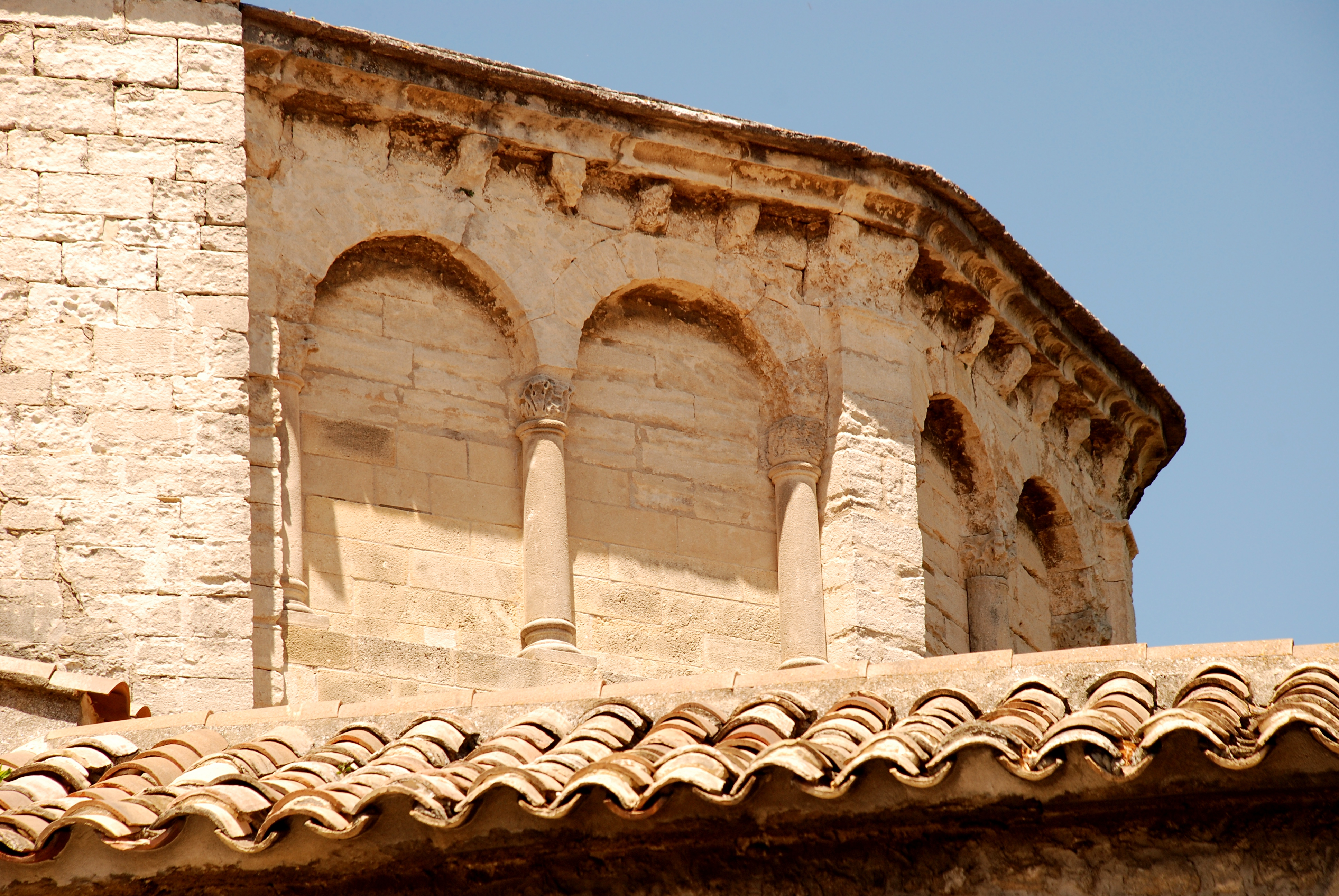 France - Provence - Église Notre-Dame-de-Nazareth de Valréas